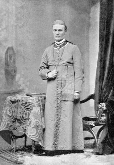 Юлий Фирцак (1836 — 1912) — епископ мукачевский с 17 декабря 1891 года по 1 июня 1912 год, русинский общественный деятель.